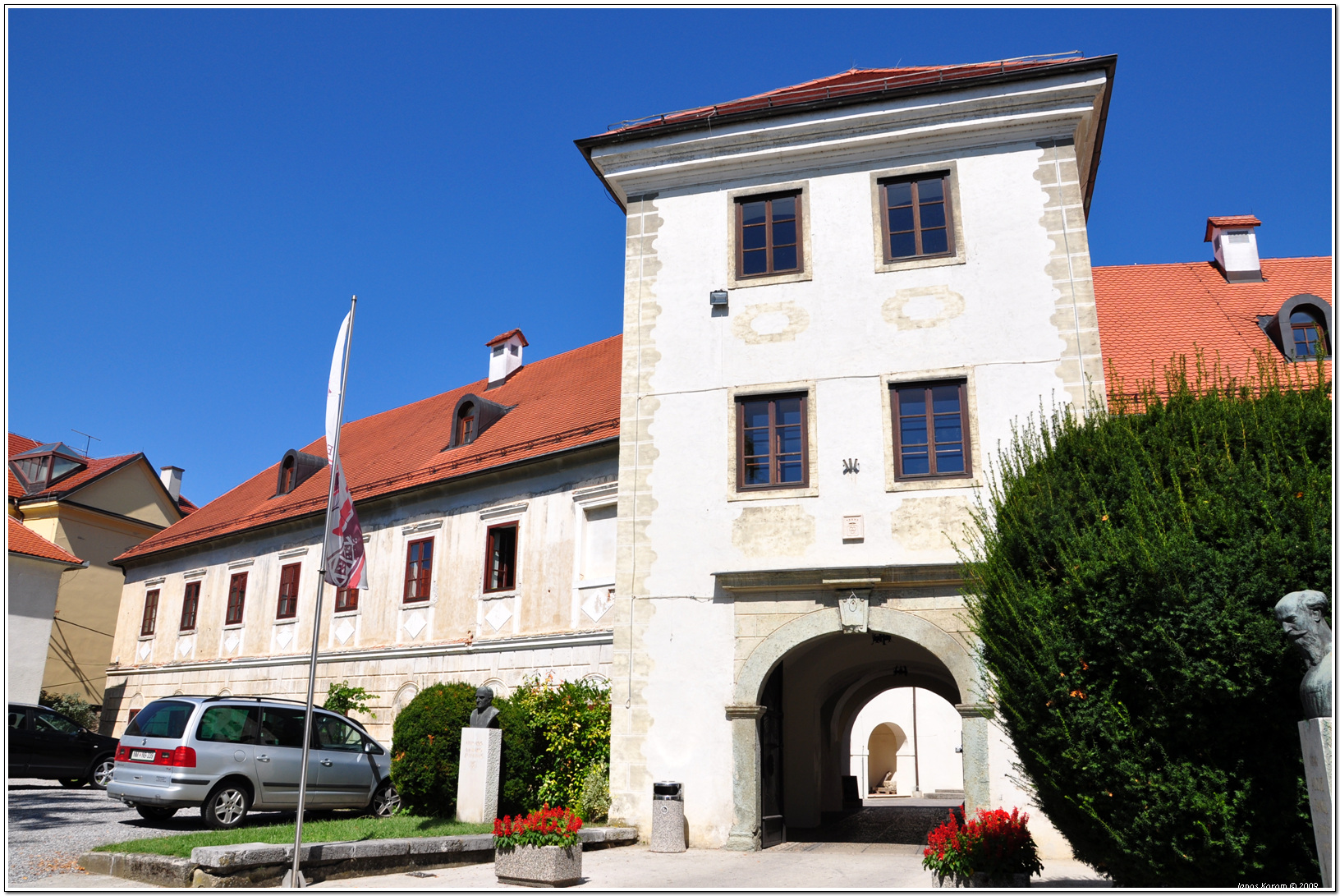 Metlika (27)